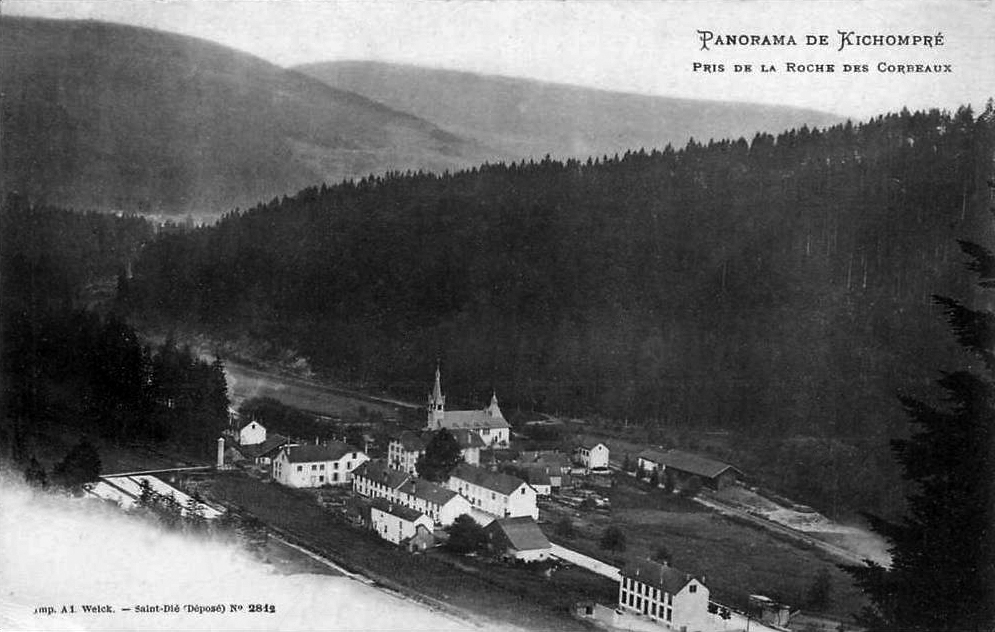 Panorama du village de Kichompré dans les Vosges, avec la gare près de l'église.